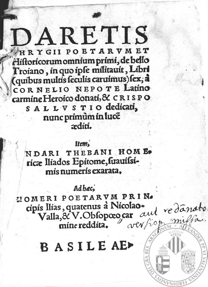 Portada del Libro De escidio troiae histoia tradución latina del siglo VI d.C. de obras griegas de los siglos II y III sobre la guerra de Troya. Narra los hechos desde la visión troyana, y sometiendo a La Ilíada a una revisión histórica que elimina toda intervención de los dioses. Firmado por Dares Frigio, posiblemente su autor fuese Josephus Devonius Iscanus (Joseph of Exeter).